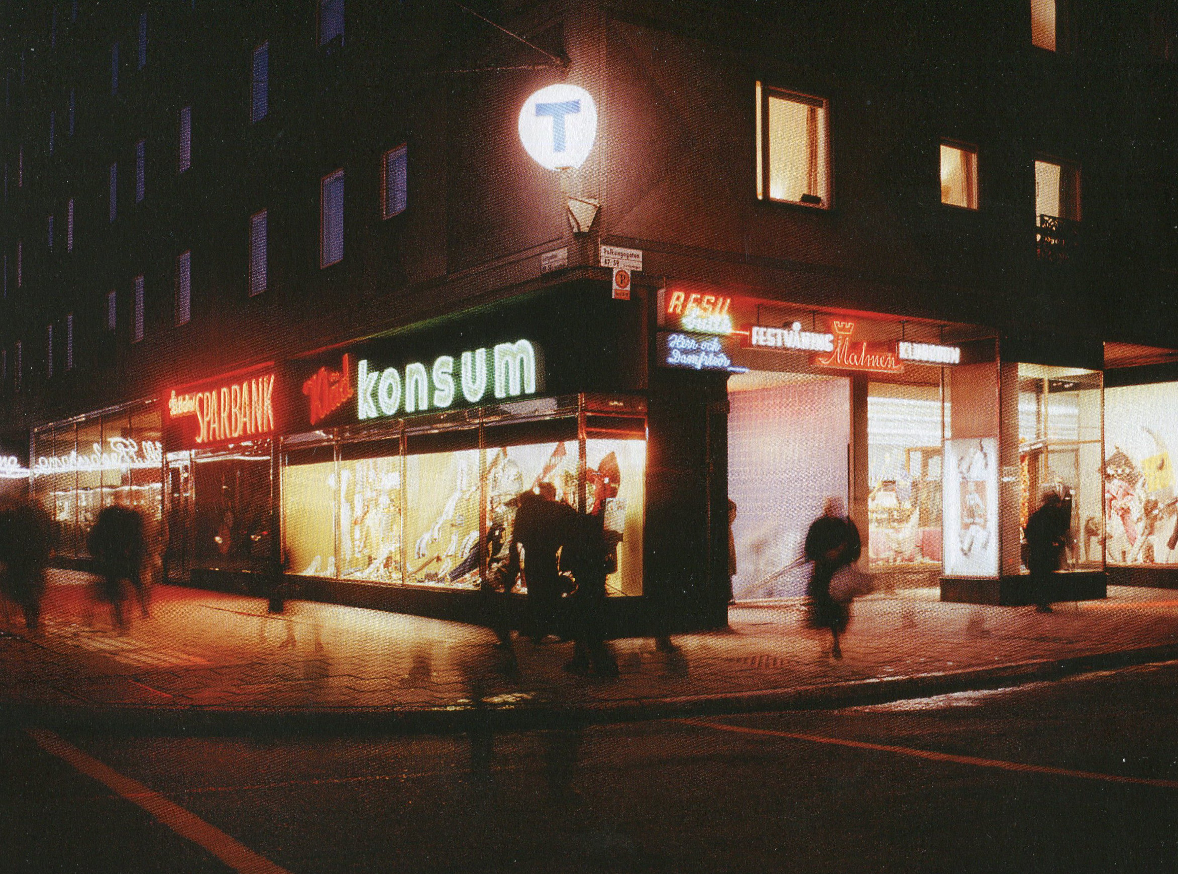 Ingången till Tunnelbanestationen "Medborgarplatsen" (hörnet Hotell Malmen) i Stockholm